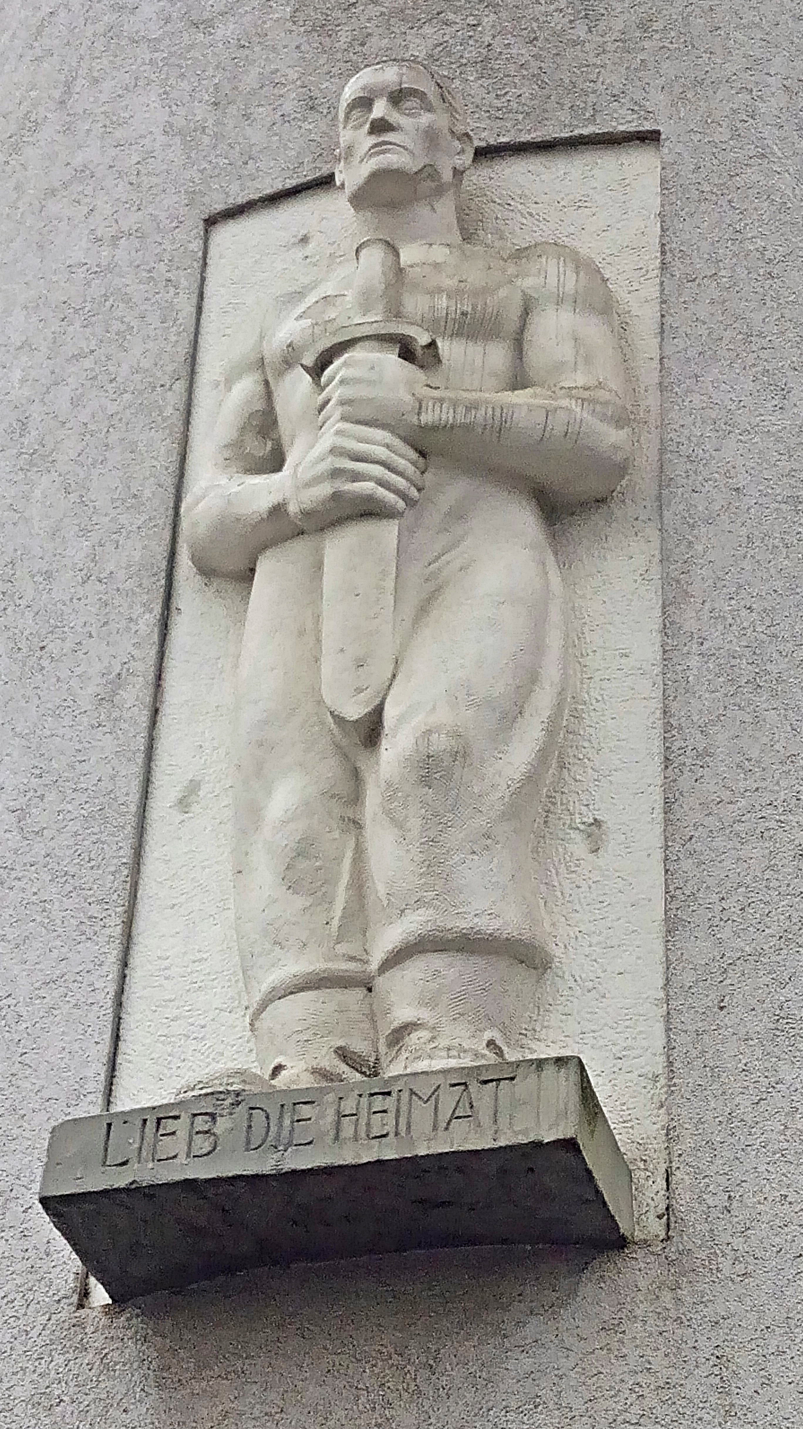 Fassadenfigur "Lieb die Heimat", von Franz Lind (1900-1967), Neustadt/Weinstraße, Friedrich-Ebert-Str. 38